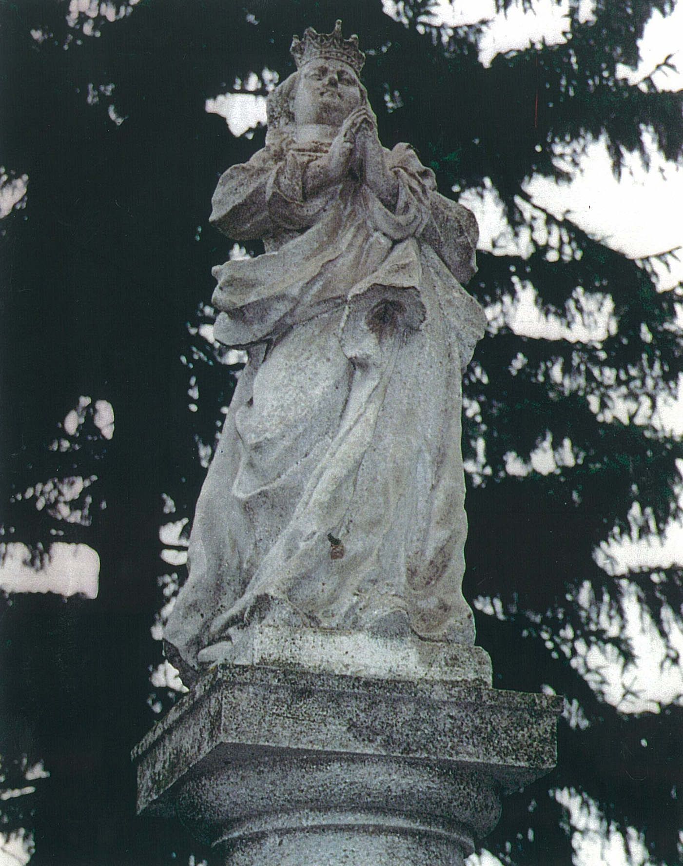 Statue der hl. Barbara in Kaisersteinbruch, Bildhauer Elias Hügel